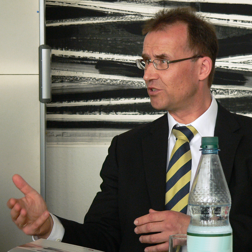 Norbert Lossau bei Pressekonfrenz im Niedersächsisches Ministerium für Wissenschaft und Kultur